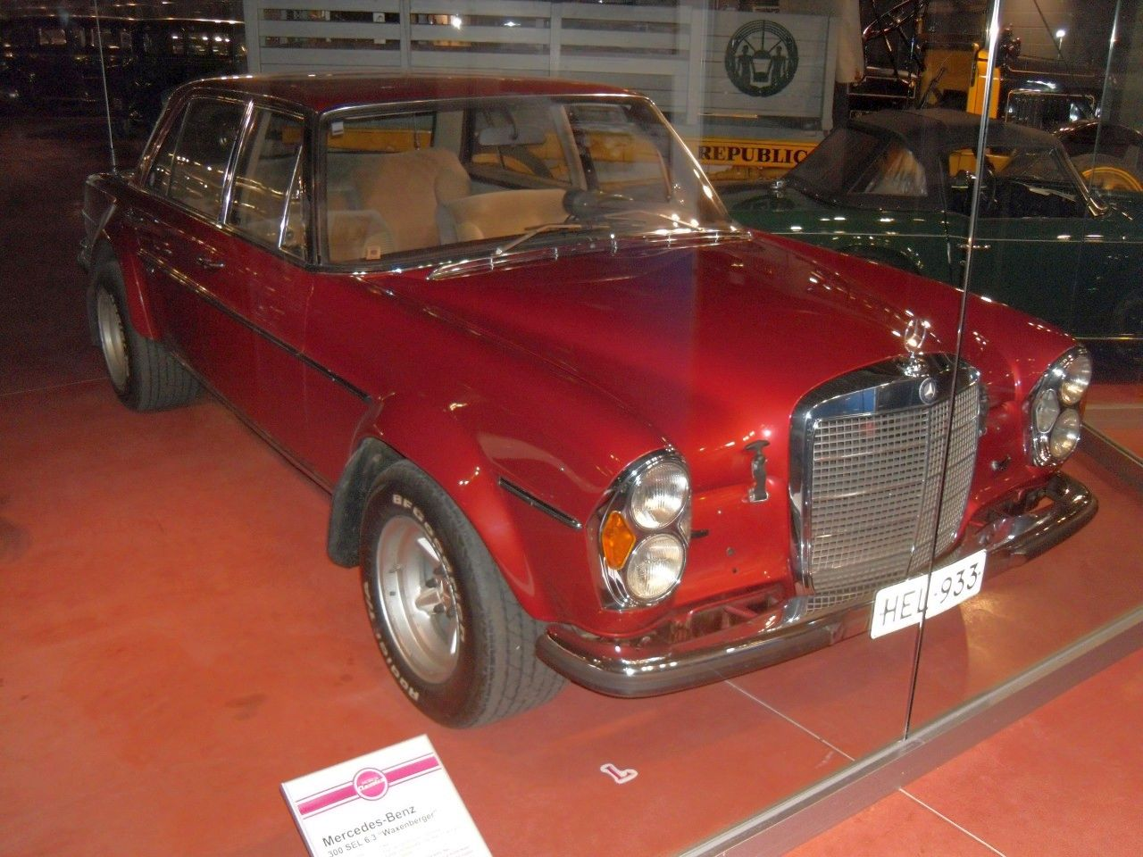 Urpo Lahtisen perikunnan omistama ainoa jäljellä oleva MB Waxenberger Kangasalan Mobilia-automuseossa.